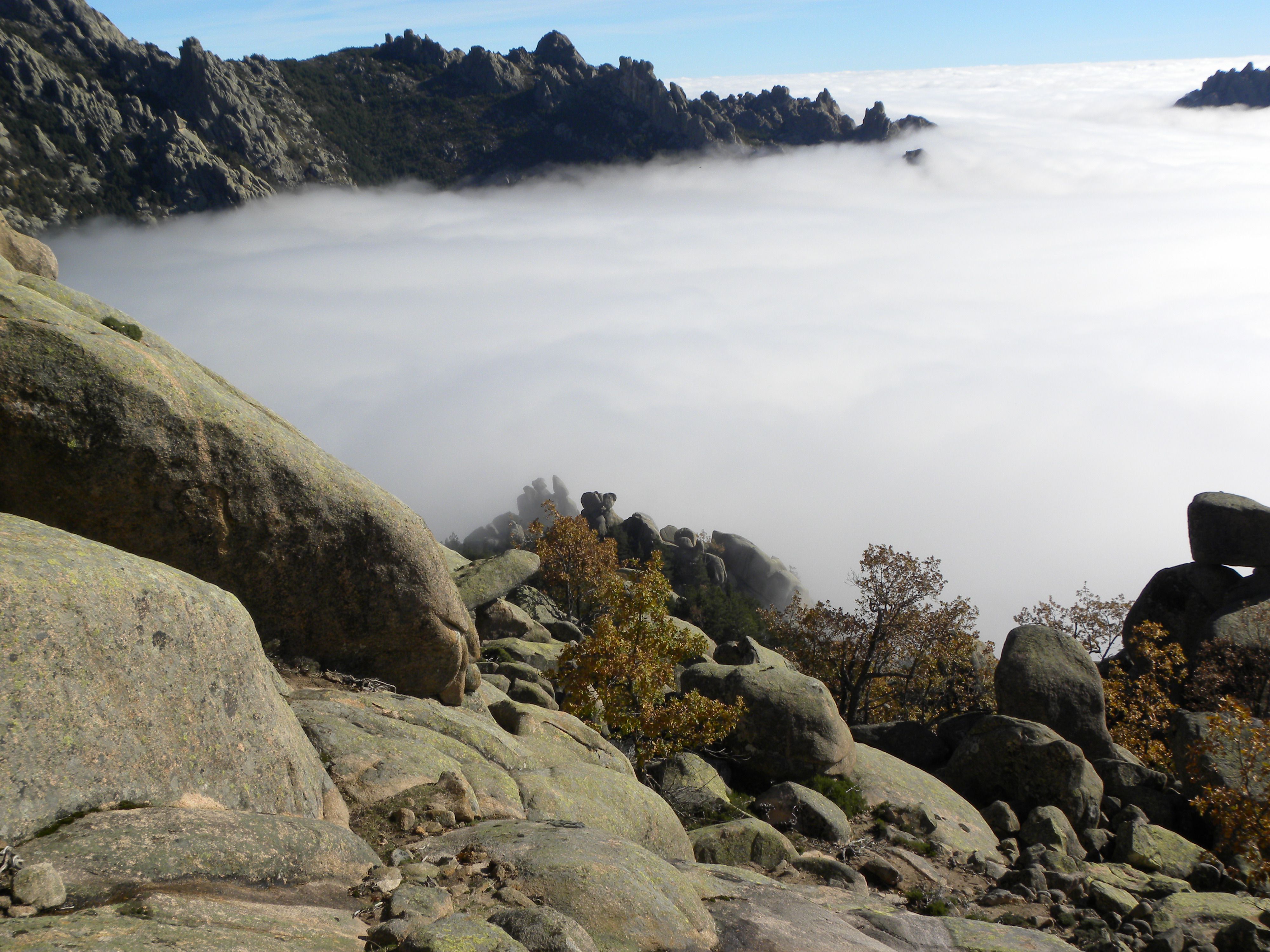 Desde Milaneras